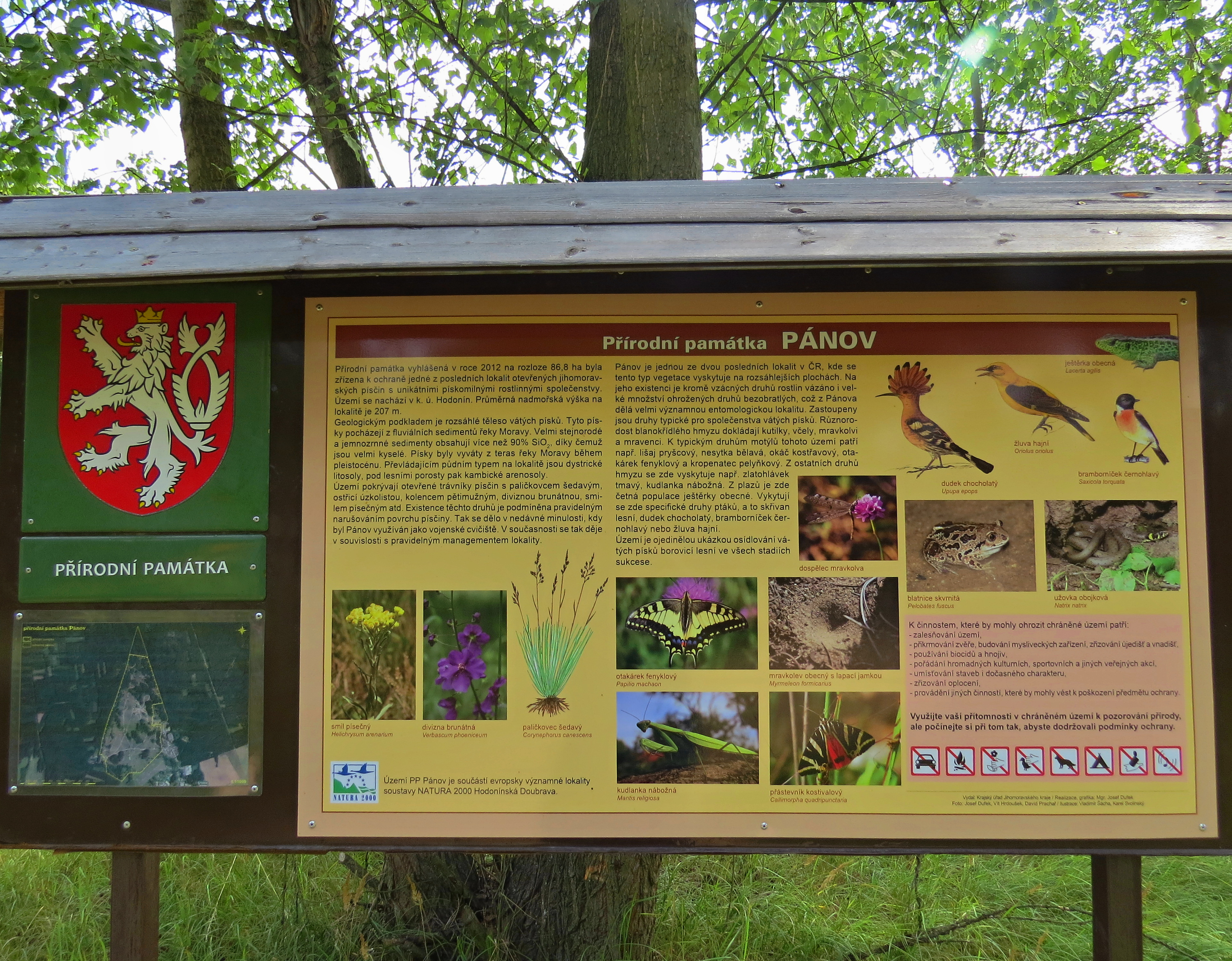 Přírodní památka Pánov - infotabule